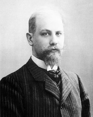 Swedish engineer and CEO Gottlieb Piltz (1874-1937)